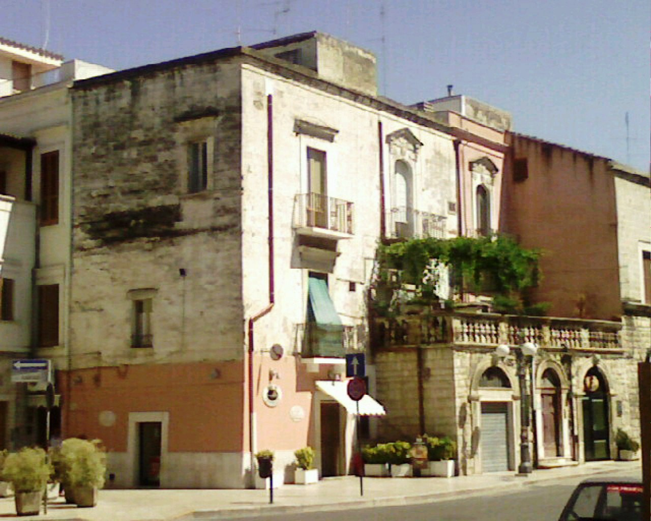 palazzo scarli- Modugno (bari)-Italy